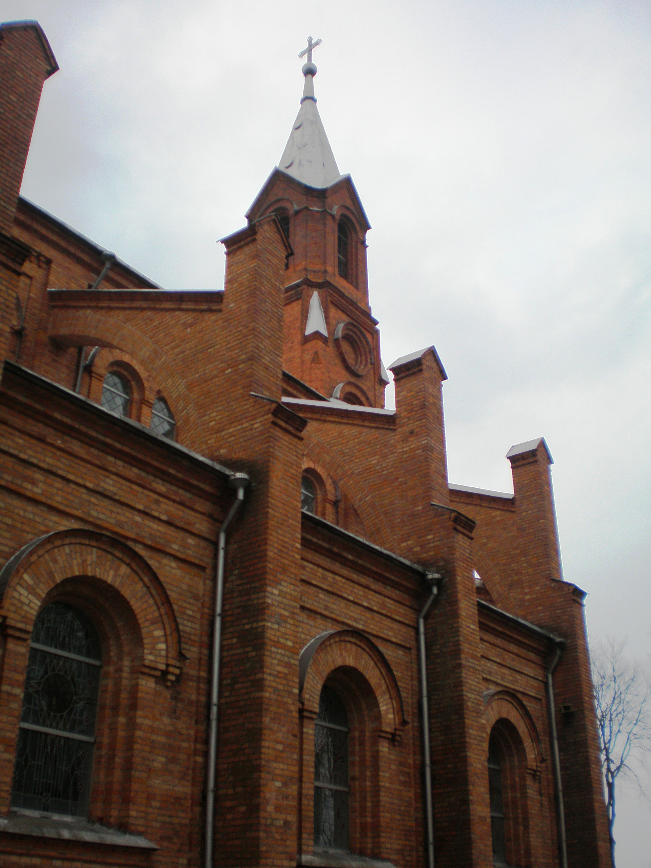 Iglesia catolica de Krakės, Lituania